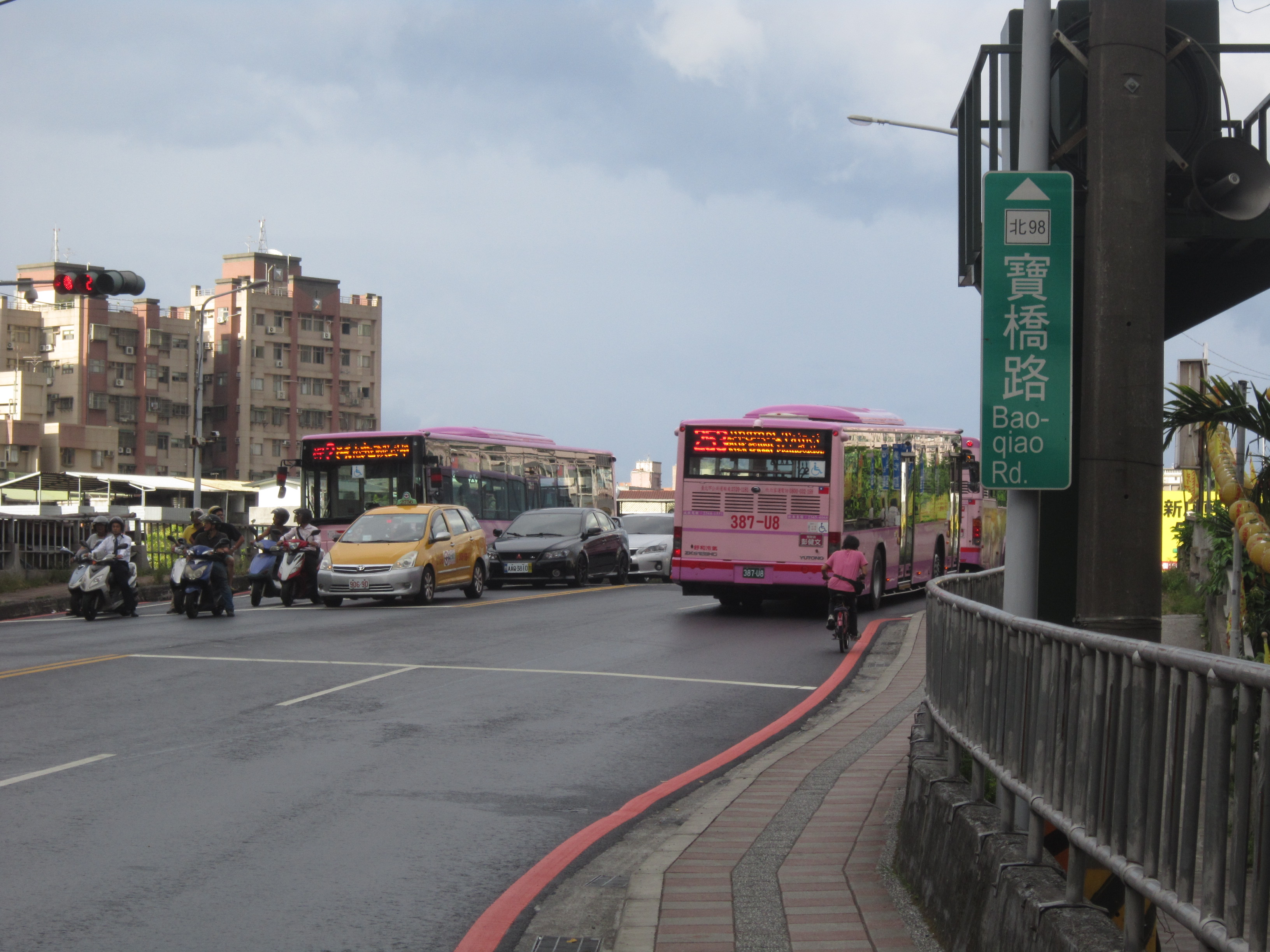 新北市新店區寶橋路的路標牌標明為北98線。